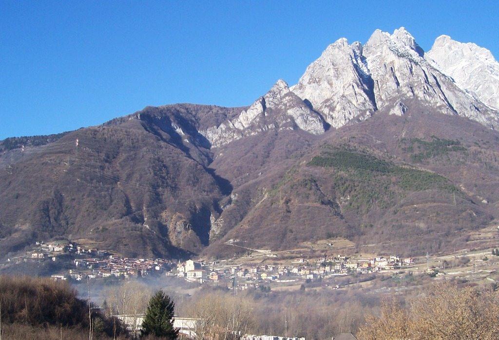 Losine, Val Camonica, Italia